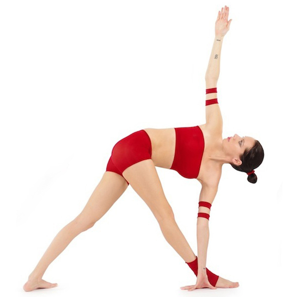 Parivrtta Trikonasana by Nina Mel, Yoga Teacher